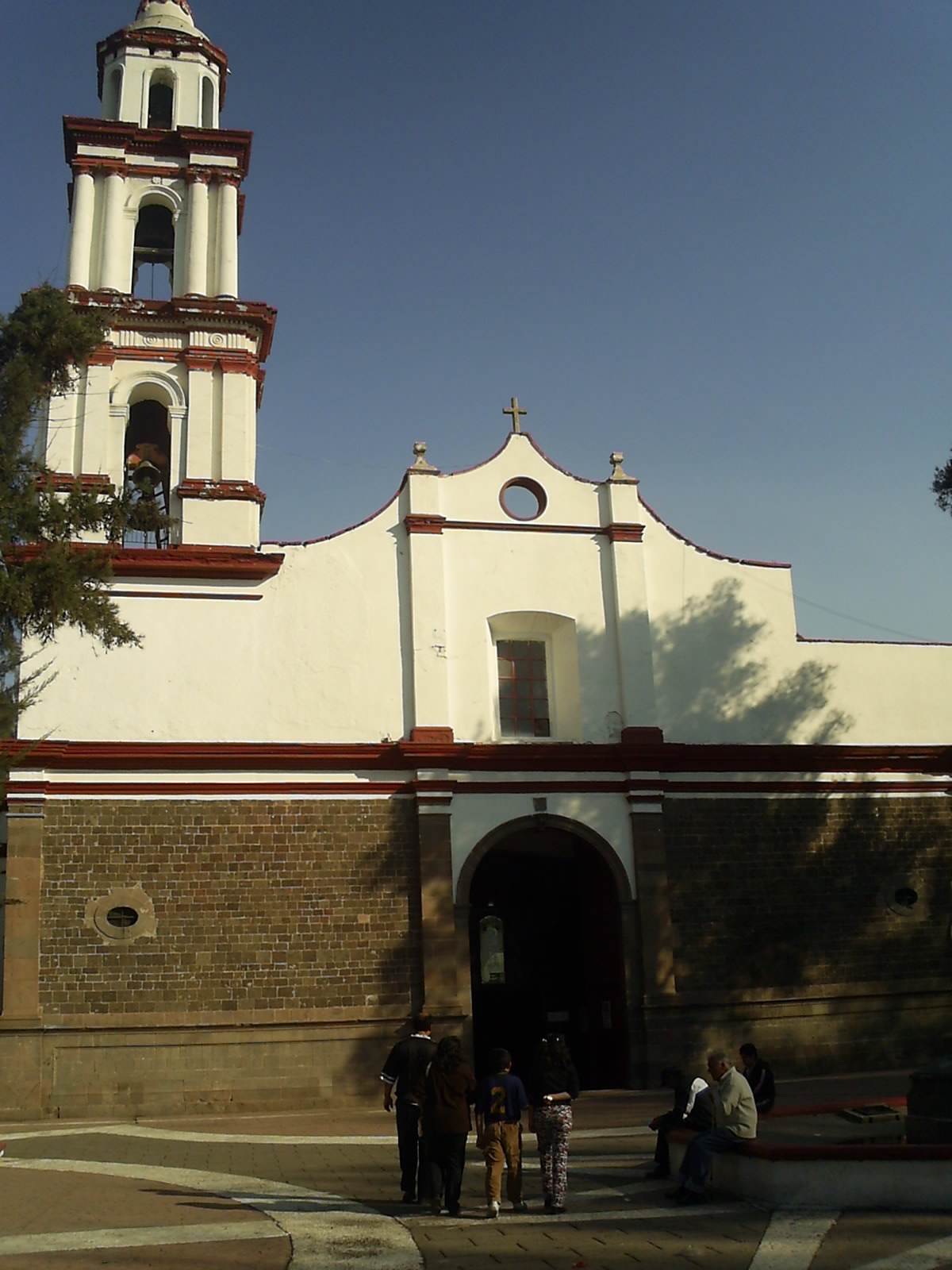 Iglesia de San Cristóbal (Ecatepec), México